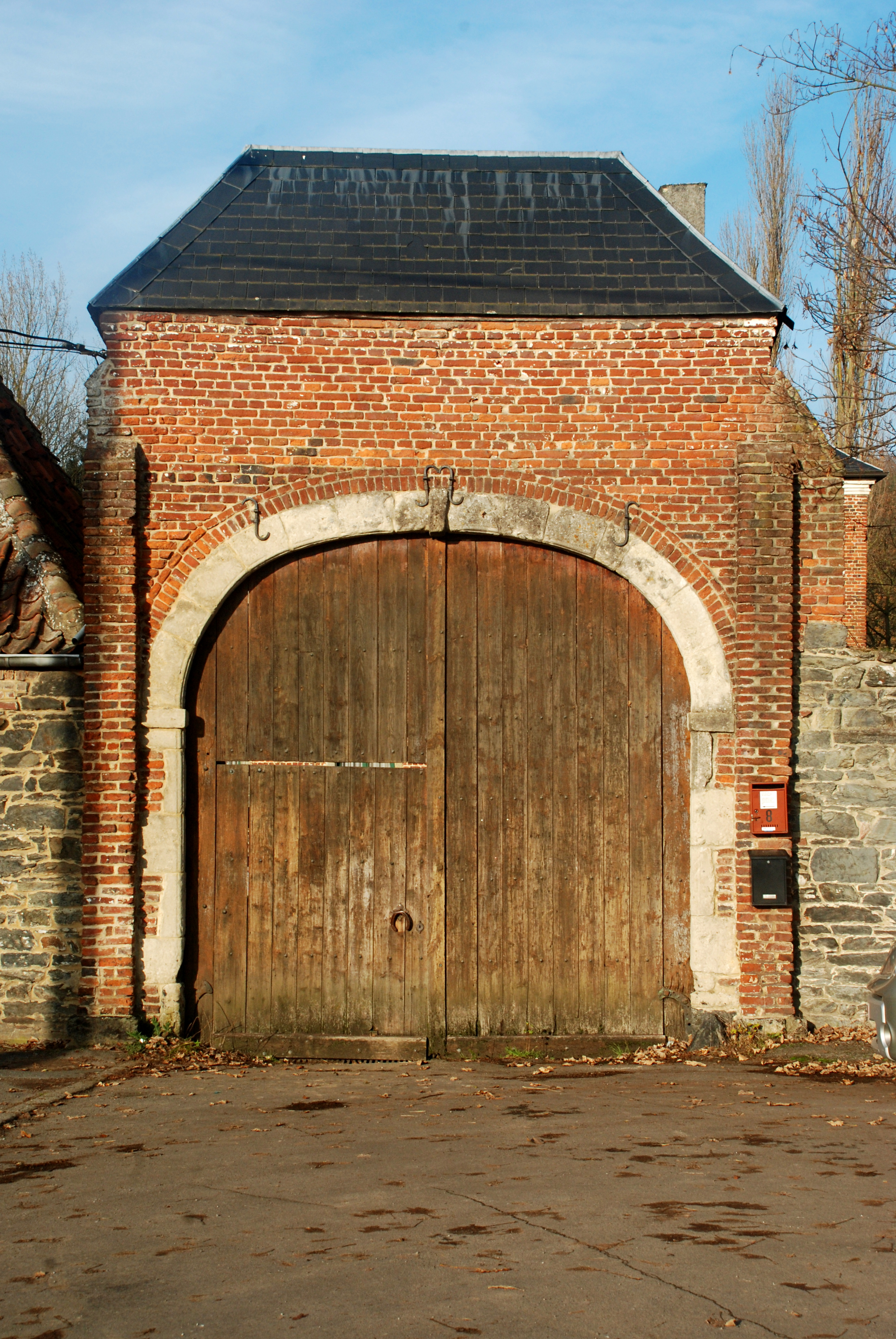 Belgique - Brabant wallon - Ottignies - Manoir de Franquenies